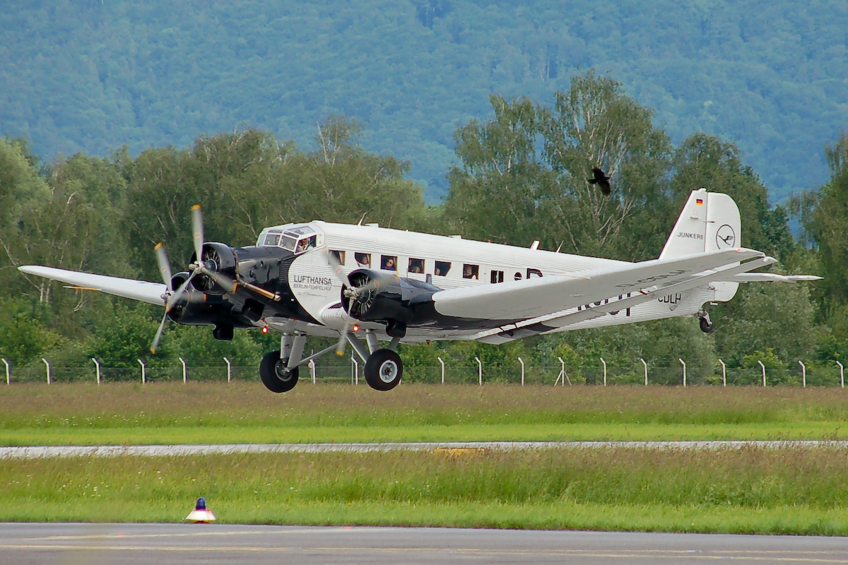 JU52 landet in Salzburg